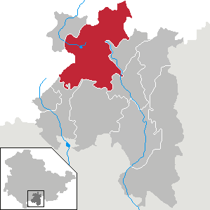 Neuhaus am Rennweg in Thüringen, Landkreis Sonneberg